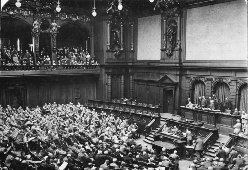 Berlin; Die Eröffnung des neuen deutschen Reichstags am 30. August 1932 unter großen polizeilichen Absperrungsmaßnahmen! Blick in den Plenarsaal des Reichstags während der Eröffnungsrede der Kommunistin Klara [Clara] Zetkin. Links im Bilde die 230 Abgeordneten der Nationalsozialisten.